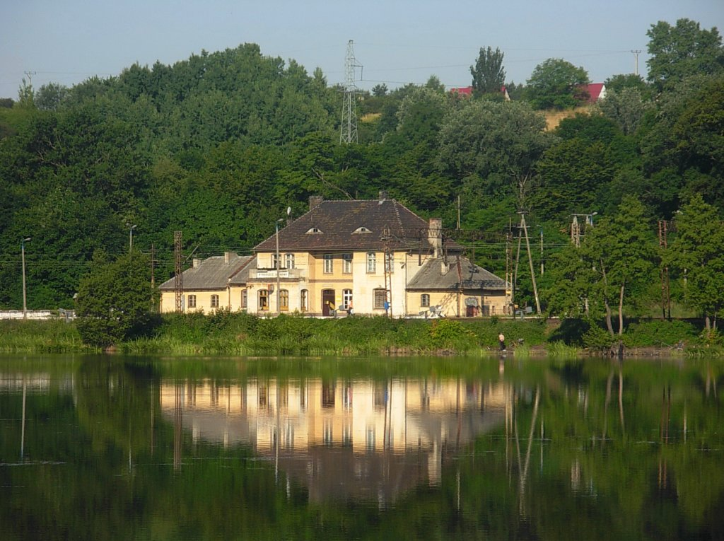 Przystanek PKP Bydgoszcz Łęgnowo przy dawnym porcie drzewnym